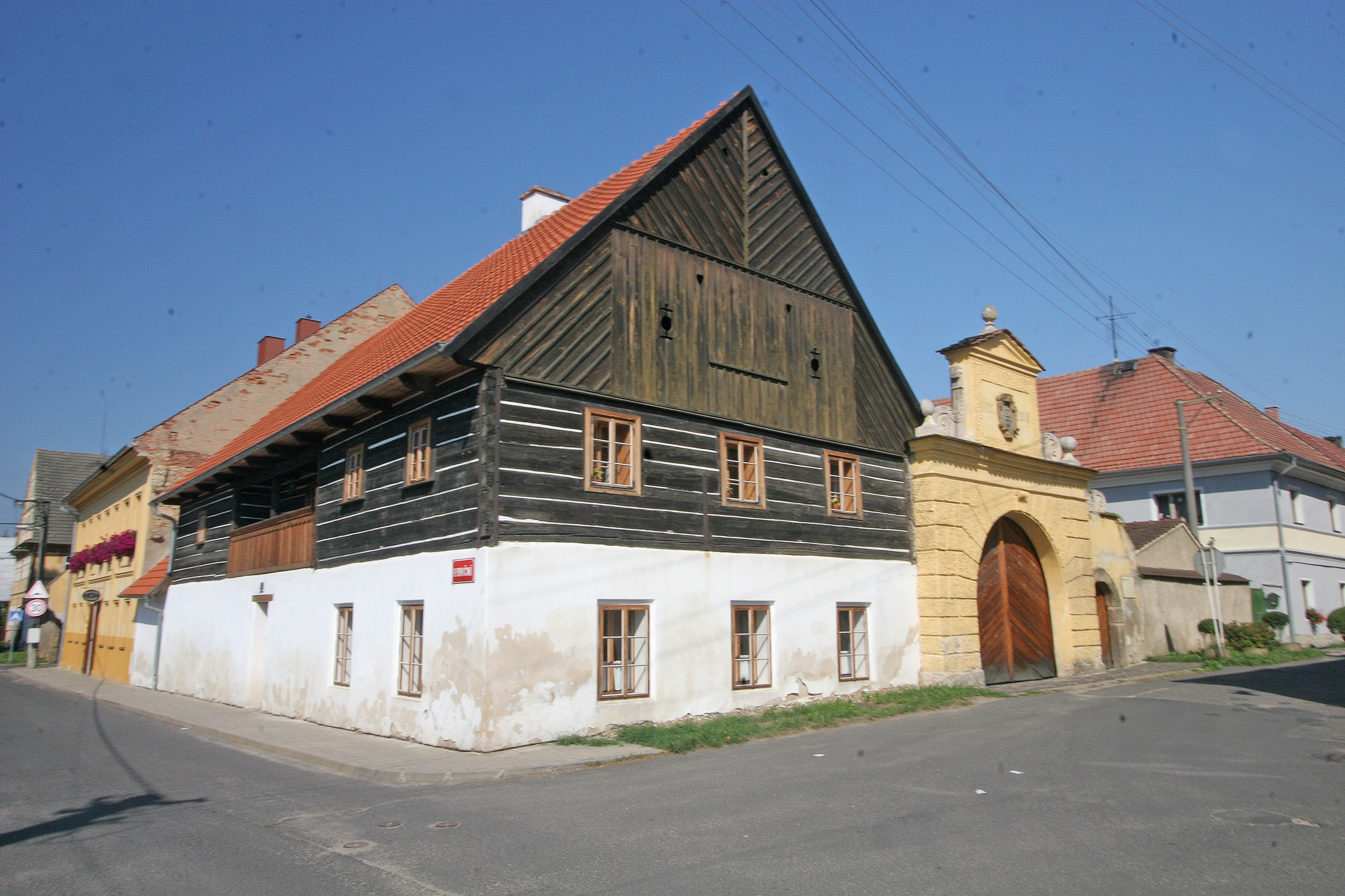 Jezuitský dvůr, Českolipské Předměstí, Konojedská 1, - bývalá sýpka